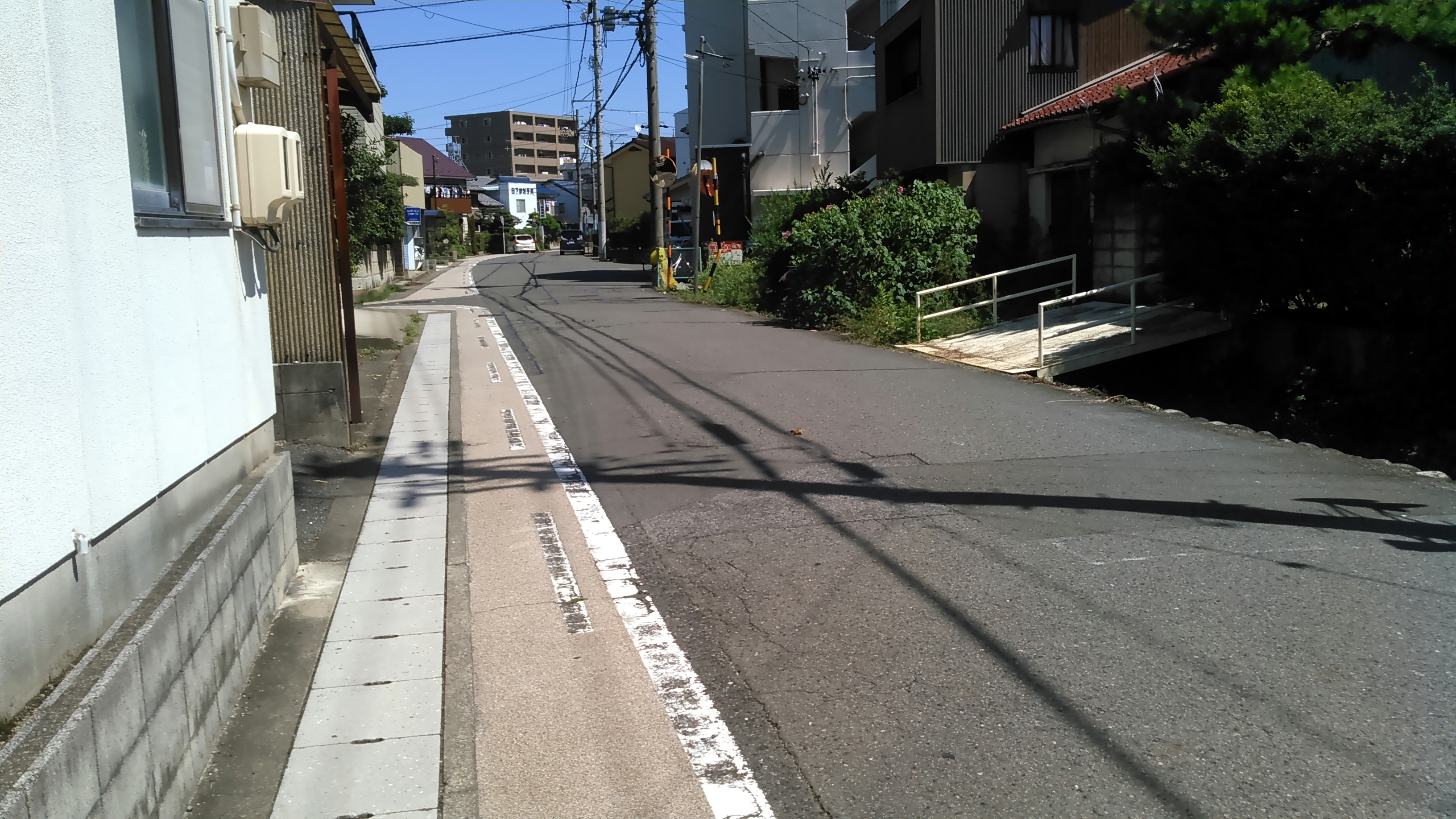 名鉄鏡島線、弘法口駅跡地。 2.5万地形図での再検証の結果による。